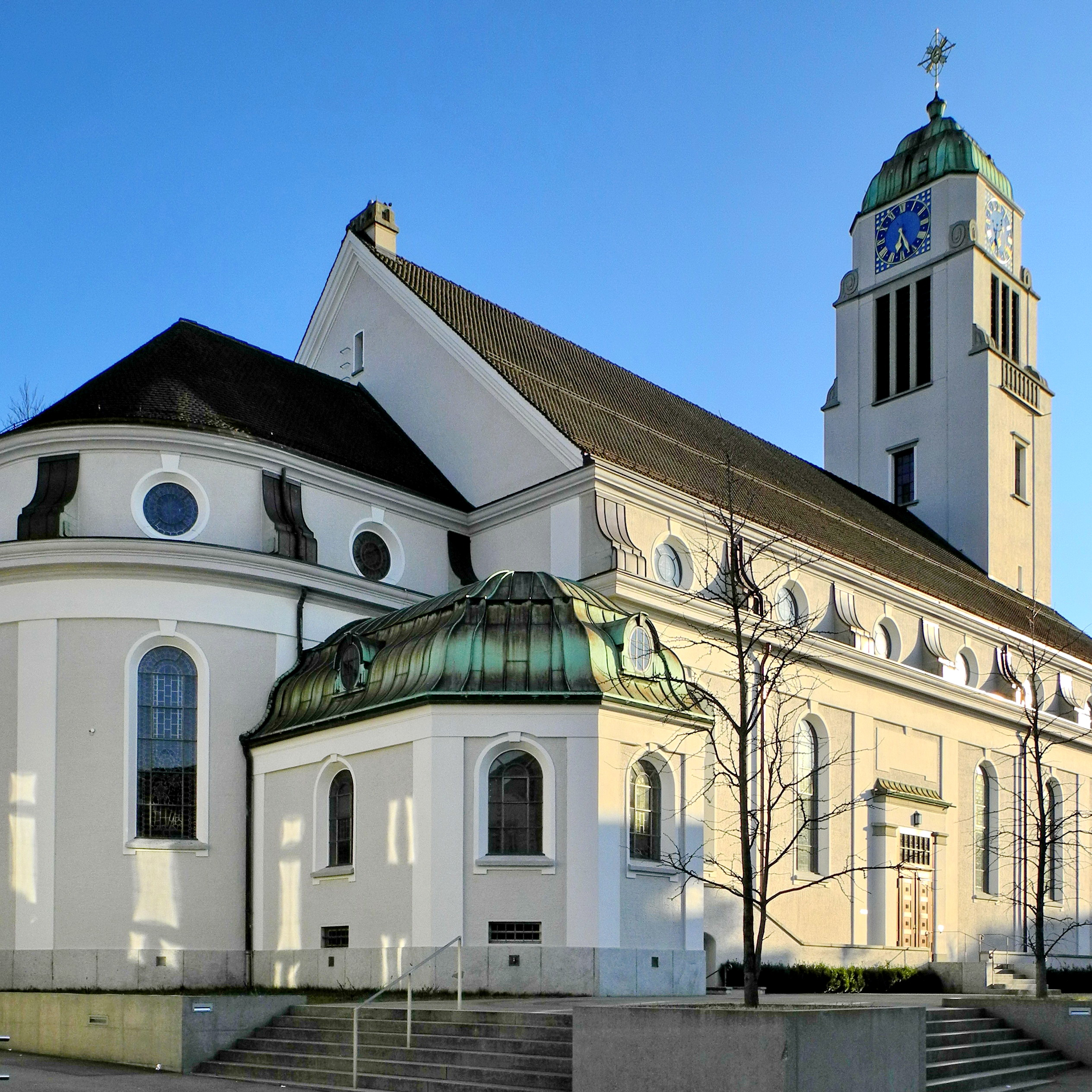 St. Agatha Kirche in Dietikon (Switzerland)